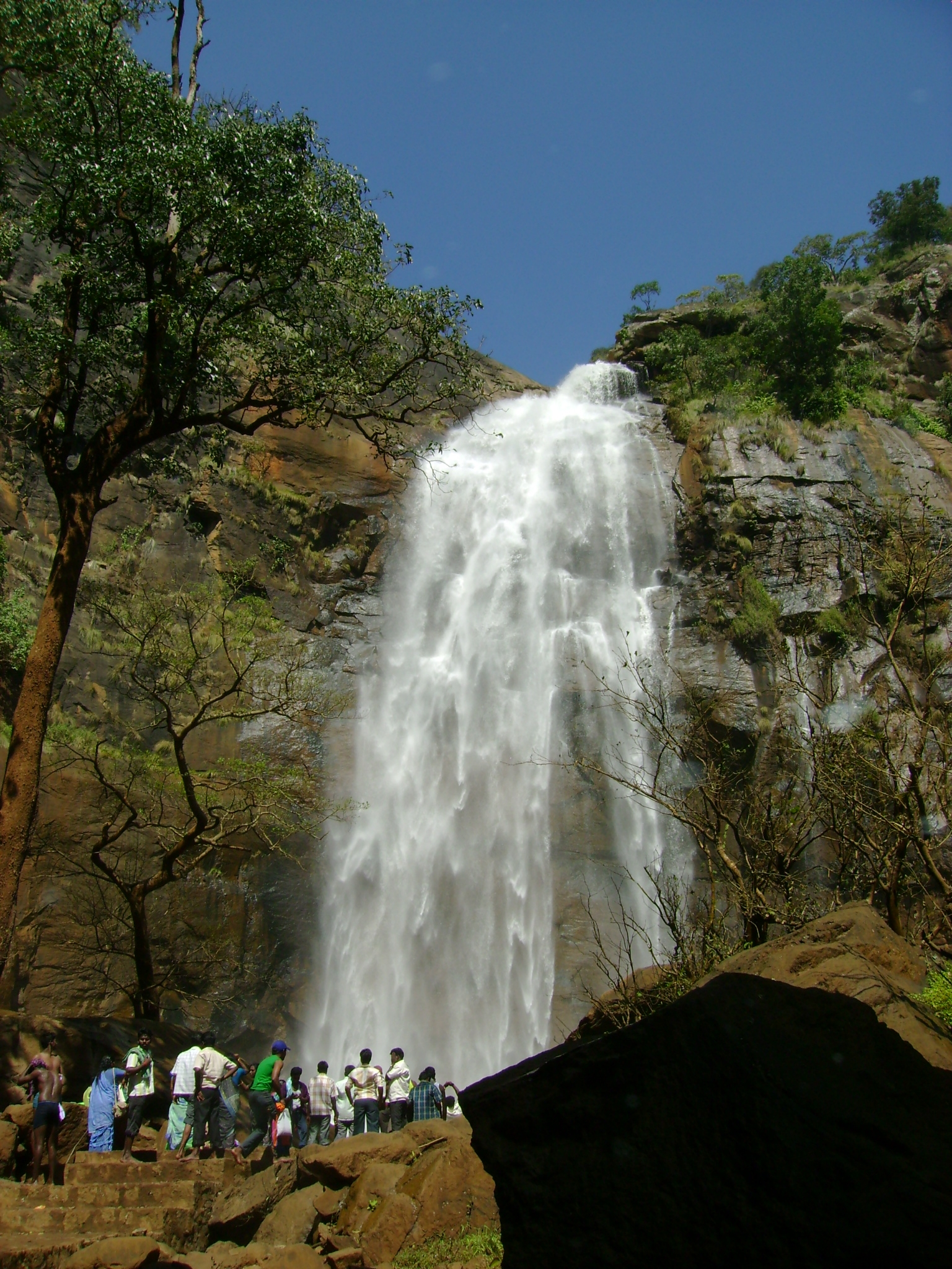 Water Falls in Kolli Hills